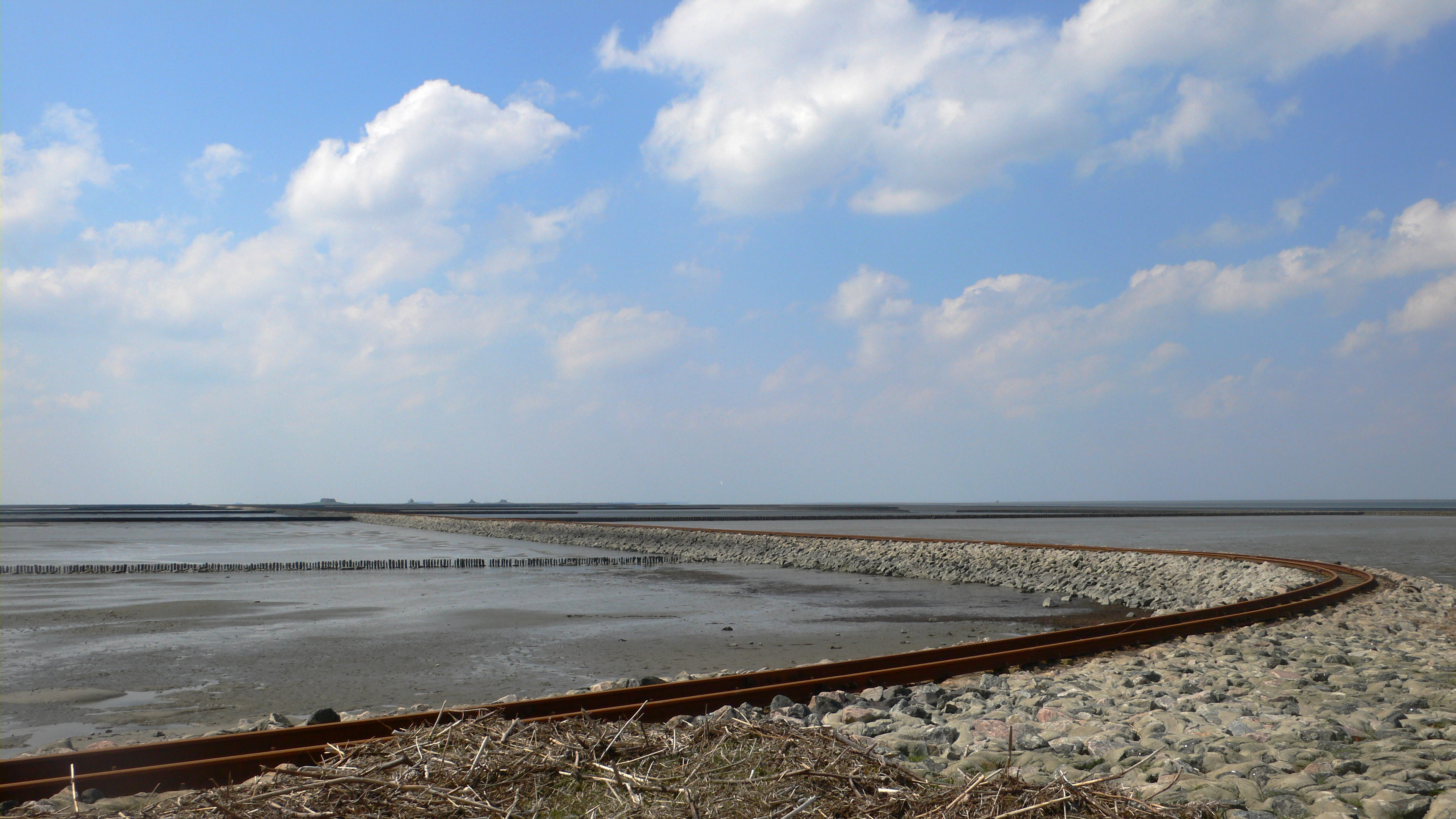 Het smalspoor naar Nordstrandischmoor, met terpen op de achtergrond.